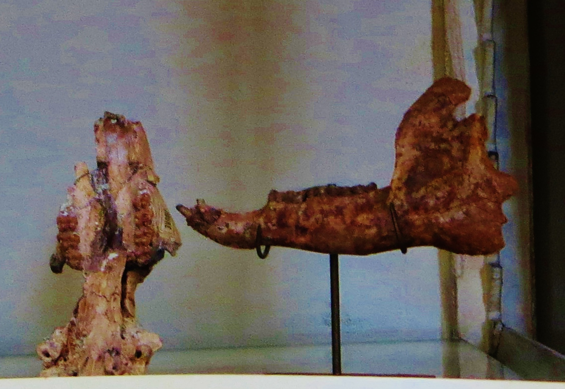 Fossil of Pleuraspidotherium, an extinct mammal - Took the photo at Musee d'Histoire Naturelle, Paris